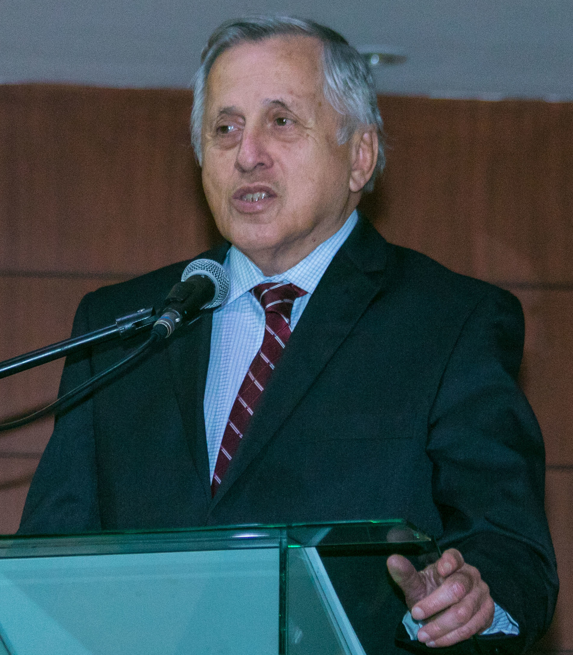 vicepresidente del ecuador